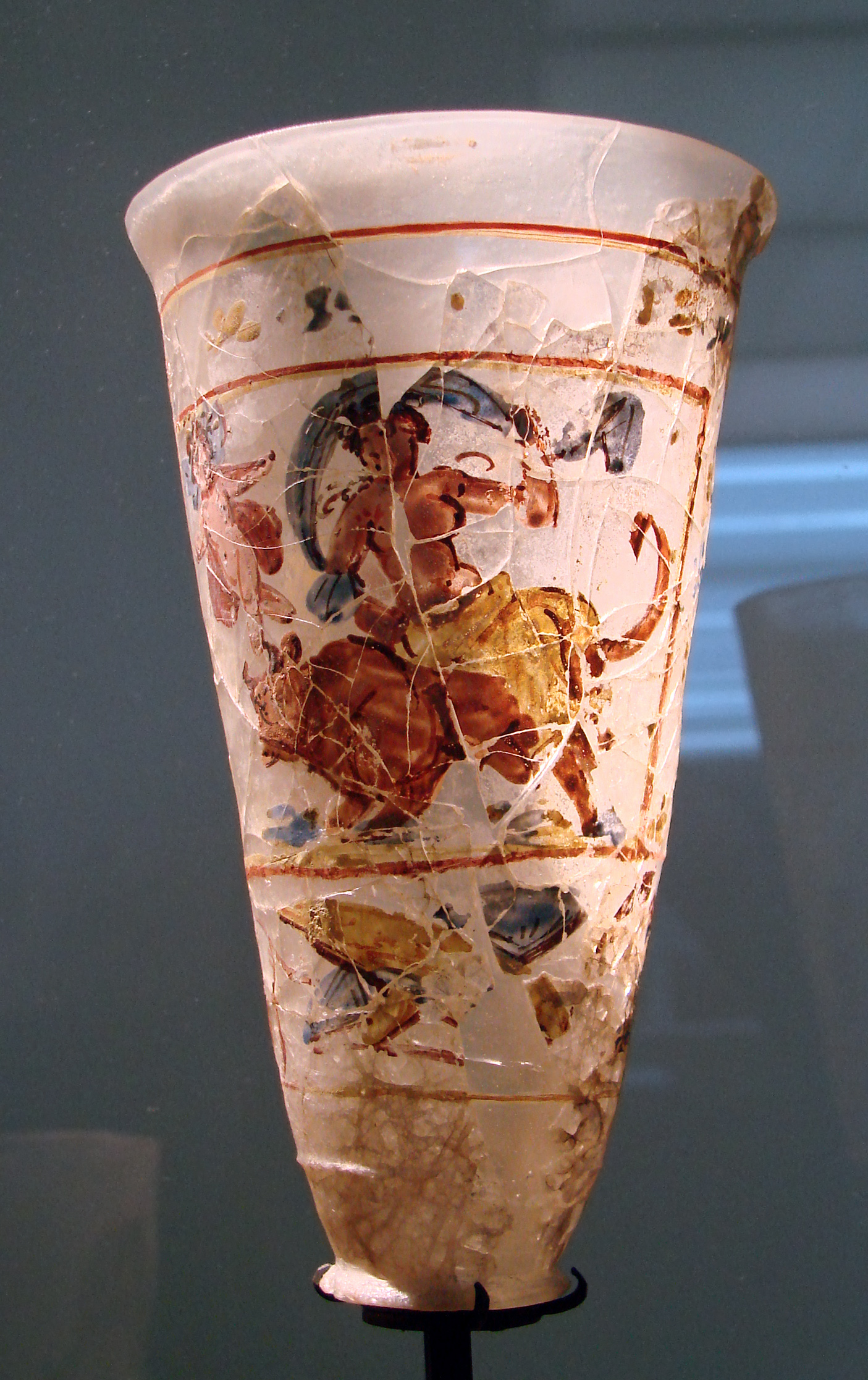 L'enlèvement d'Europe, verre émaillé, 1er siècle après JC, trésor de Begram, région de Kapiça, Afghanistan. Musée Guimet, Paris.